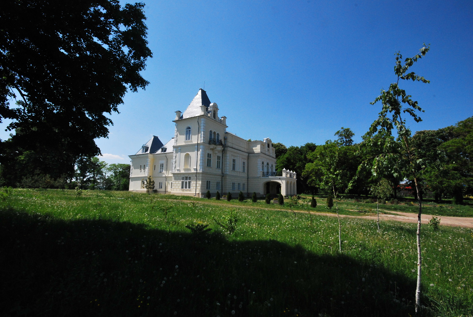 Conacul Cantacuzino - Pașcanu 01